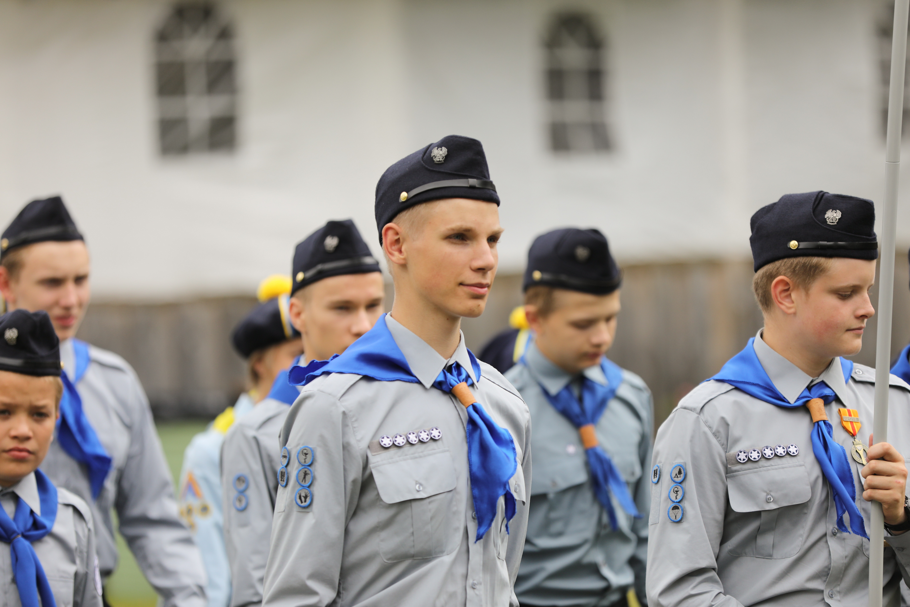 Noored Kotkad Spekter suurlaagris. Foto: Eliise Riimand